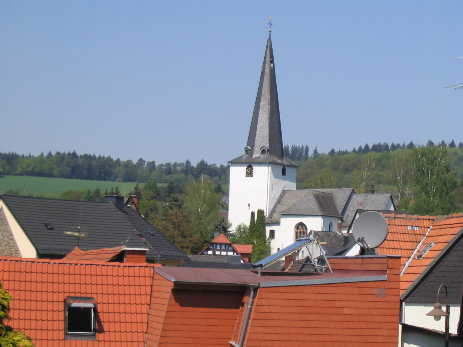 Leun, eglise protestante